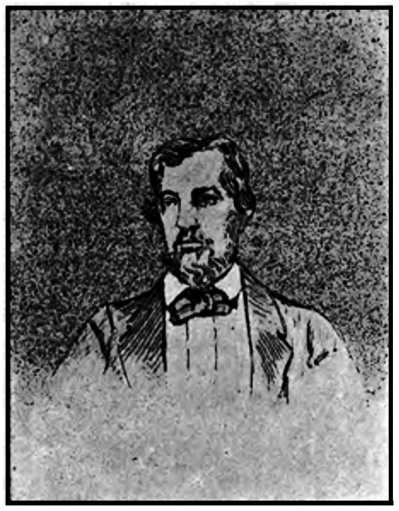 Portrait de Émile Nau paure en 1894 dans son ouvrage Histoire des caciques de Haïti. Appendice : Géographie primitive d'Haïti : De la langue et de la littérature des aborigènes d'Haïti. Flore indienne d'Haïti par Eugène Nau & "Notice biographique", Émile Nau, Paris, G. Guérin